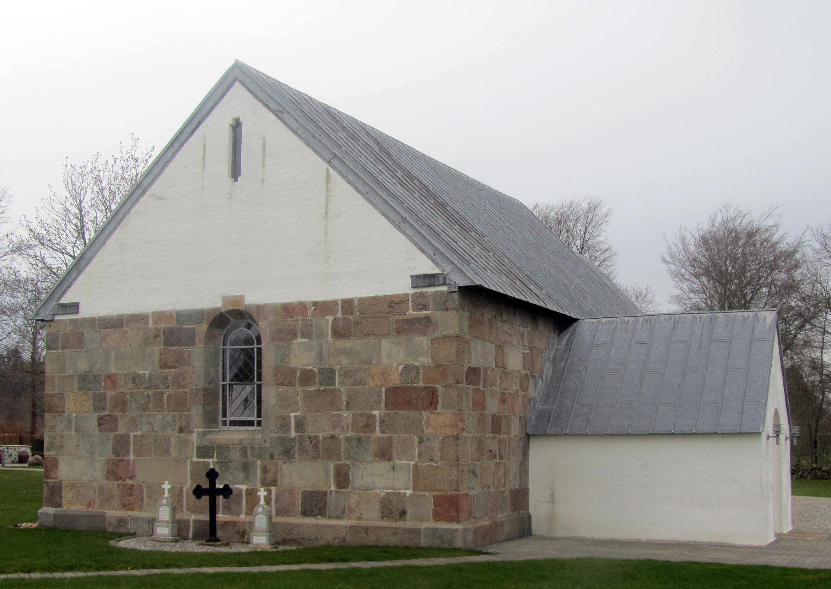 Arnborg Kirke set fra vest